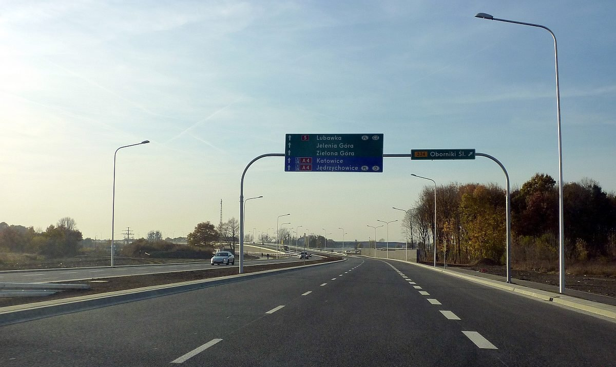 Obwodnica śródmiejska Wrocławia - odcinek północny (pomiędzy ul Żmigrodzką a Obornicką).